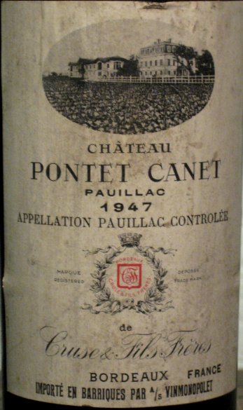 Château Pontet Canet 1947 label